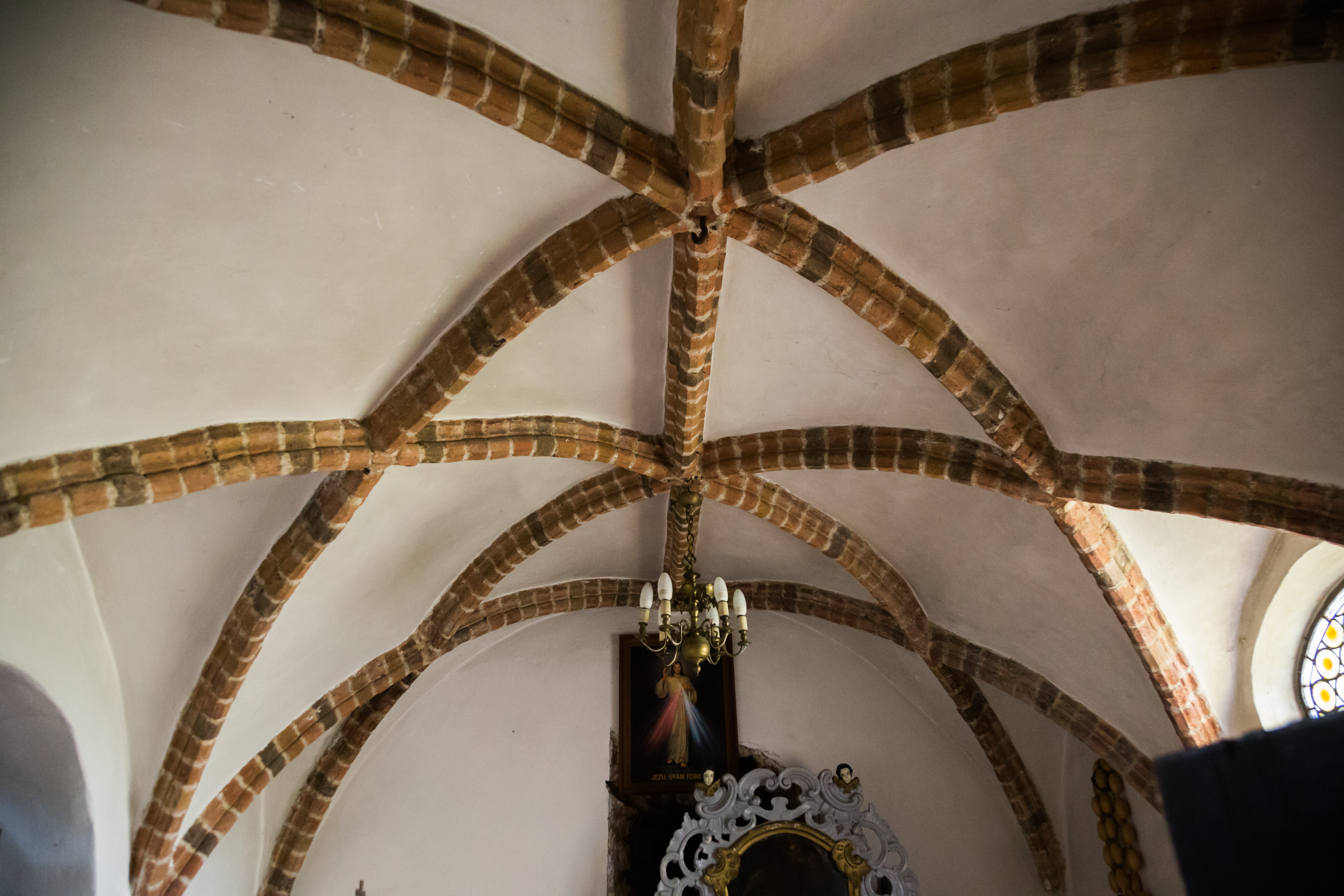 Nieszawa, kościół św. Jadwigi, późnogotyckie sieciowe sklepienie kaplicy przy prezbiterium.